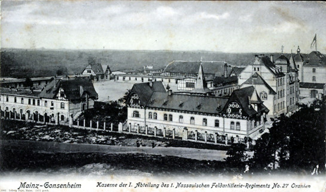 Kaserne des Nassauischen Feld-Artillerie-Regiments Nr. 27 Oranien in Gonsenheim.